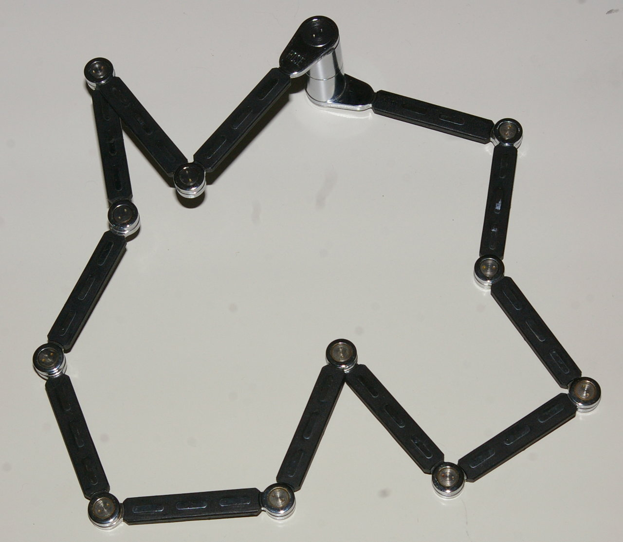 Fahrradschloss in Zollstock-/Gelenkschloss Bauweise